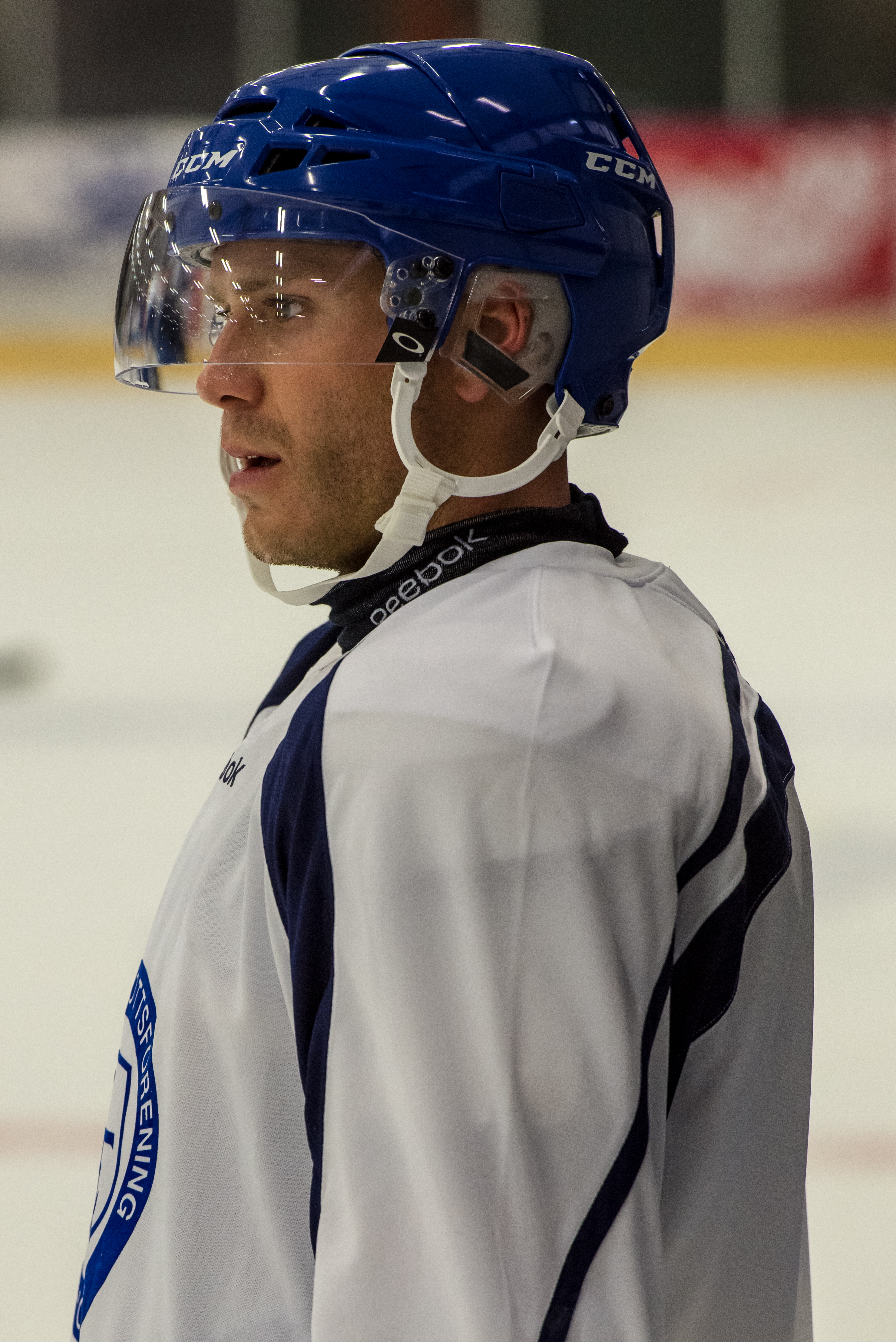 Matt Fornataro, forward i Leksands IF säsongen 2013/2014.